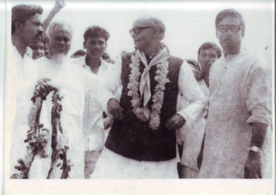 মোজাম্মেল হক সমাজী ,ডান থেকে প্রথম